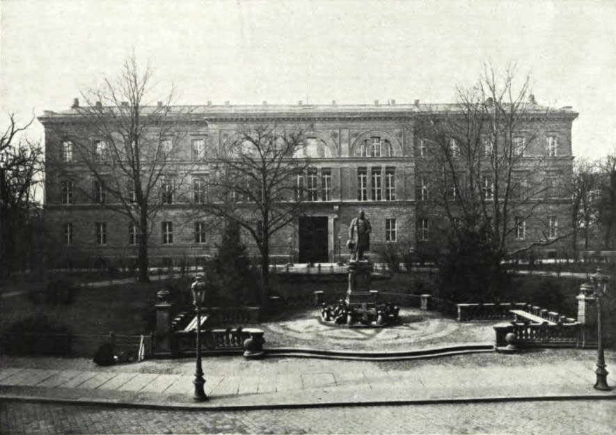 Regierungsgebäude (Landeshaus) und Kaiser-Wilhelm-Denkmal am Regierungsplatz (Annabergplatz) in Oppeln, Oberschlesien, Deutschland.